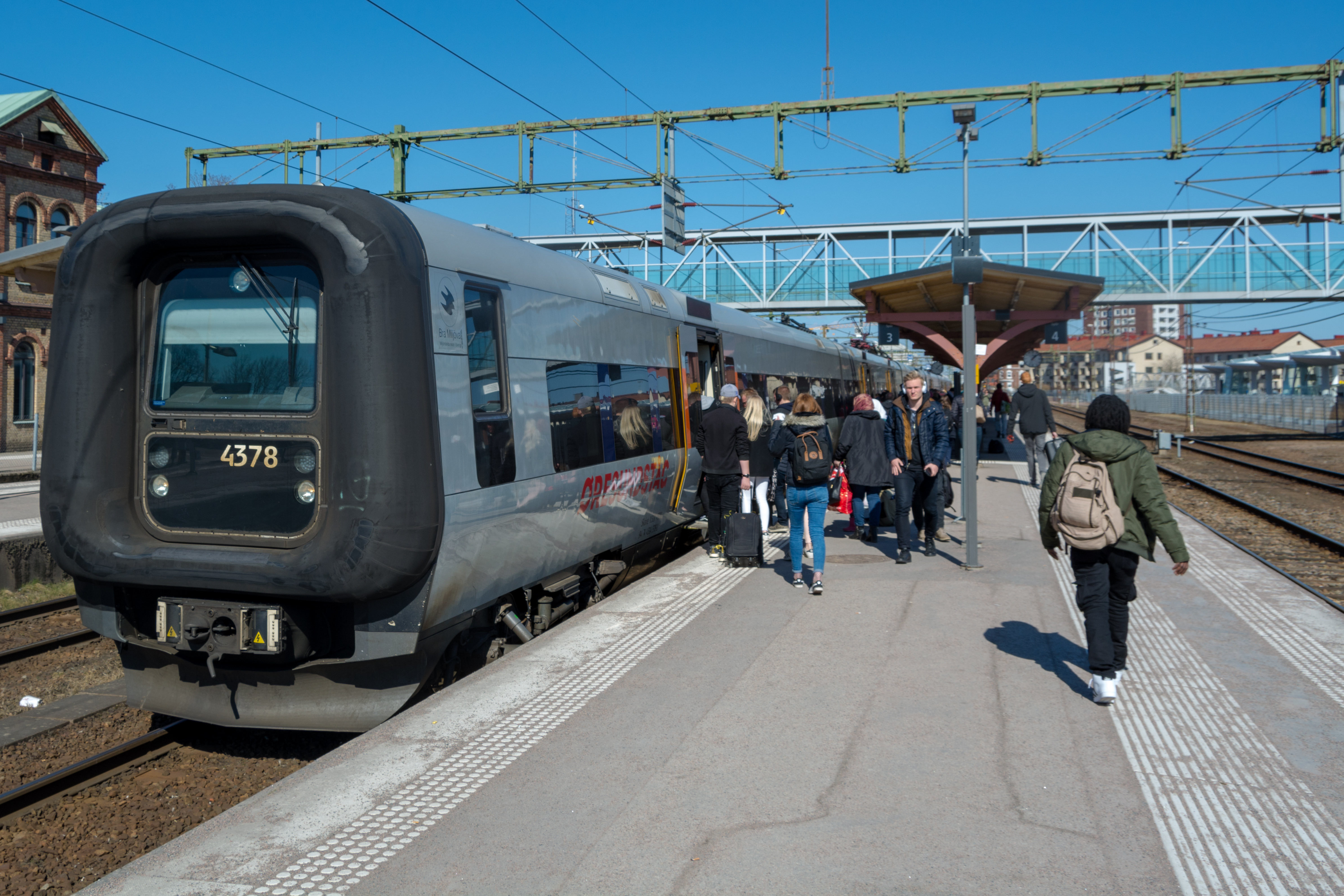 X31K vid Halmstad C